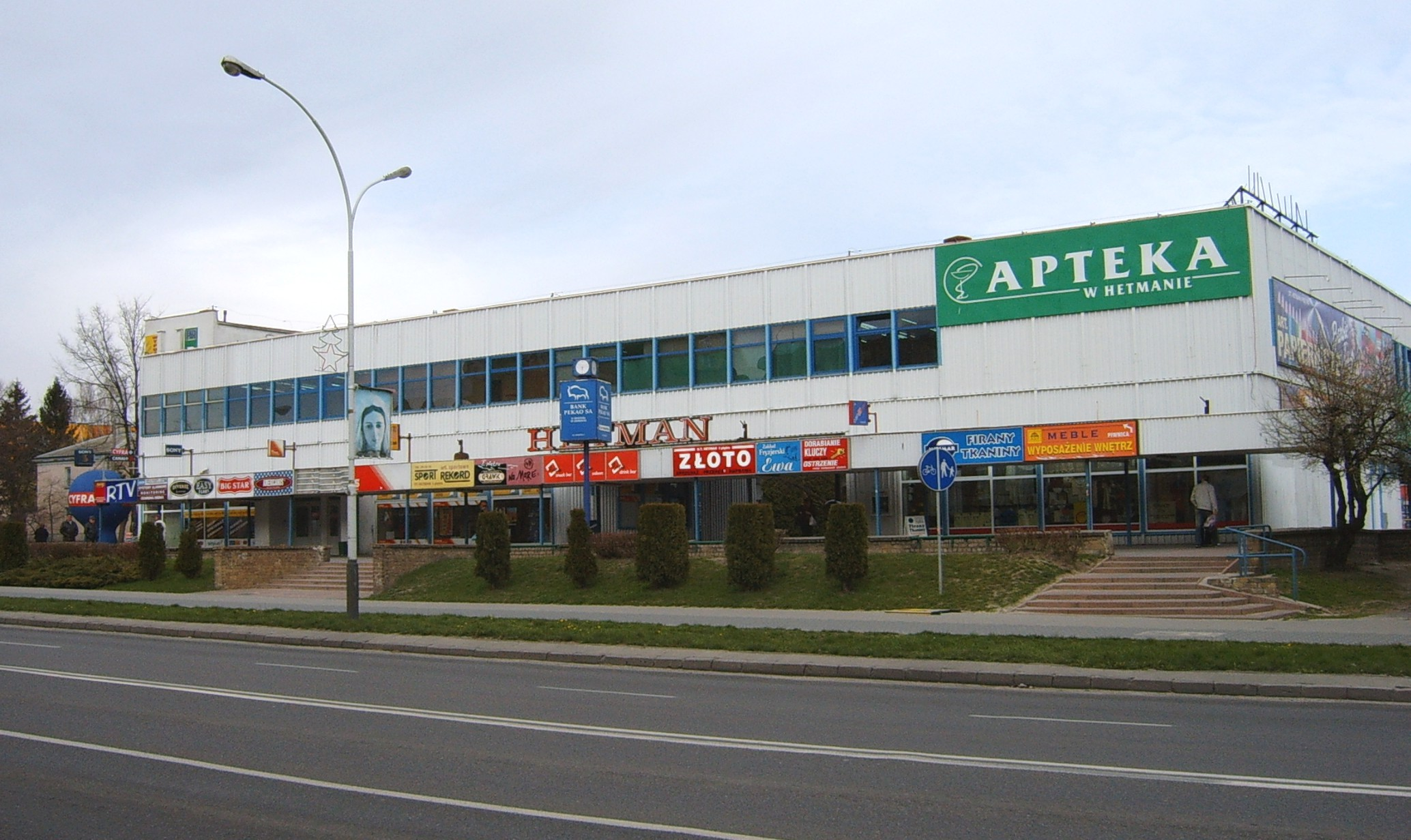 Dom handlowy Hetman w Zamościu